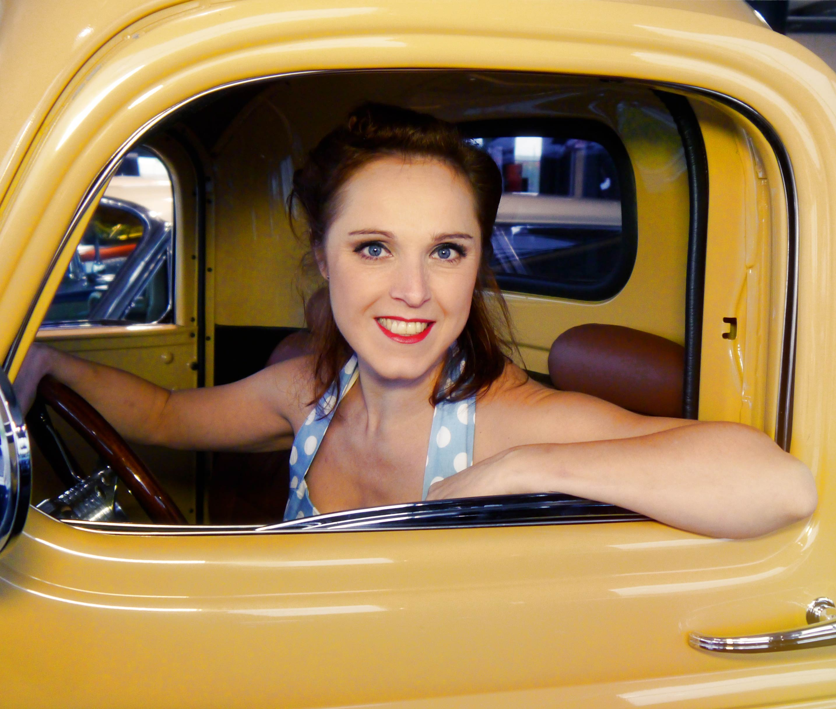 Anita Hofmann 2016